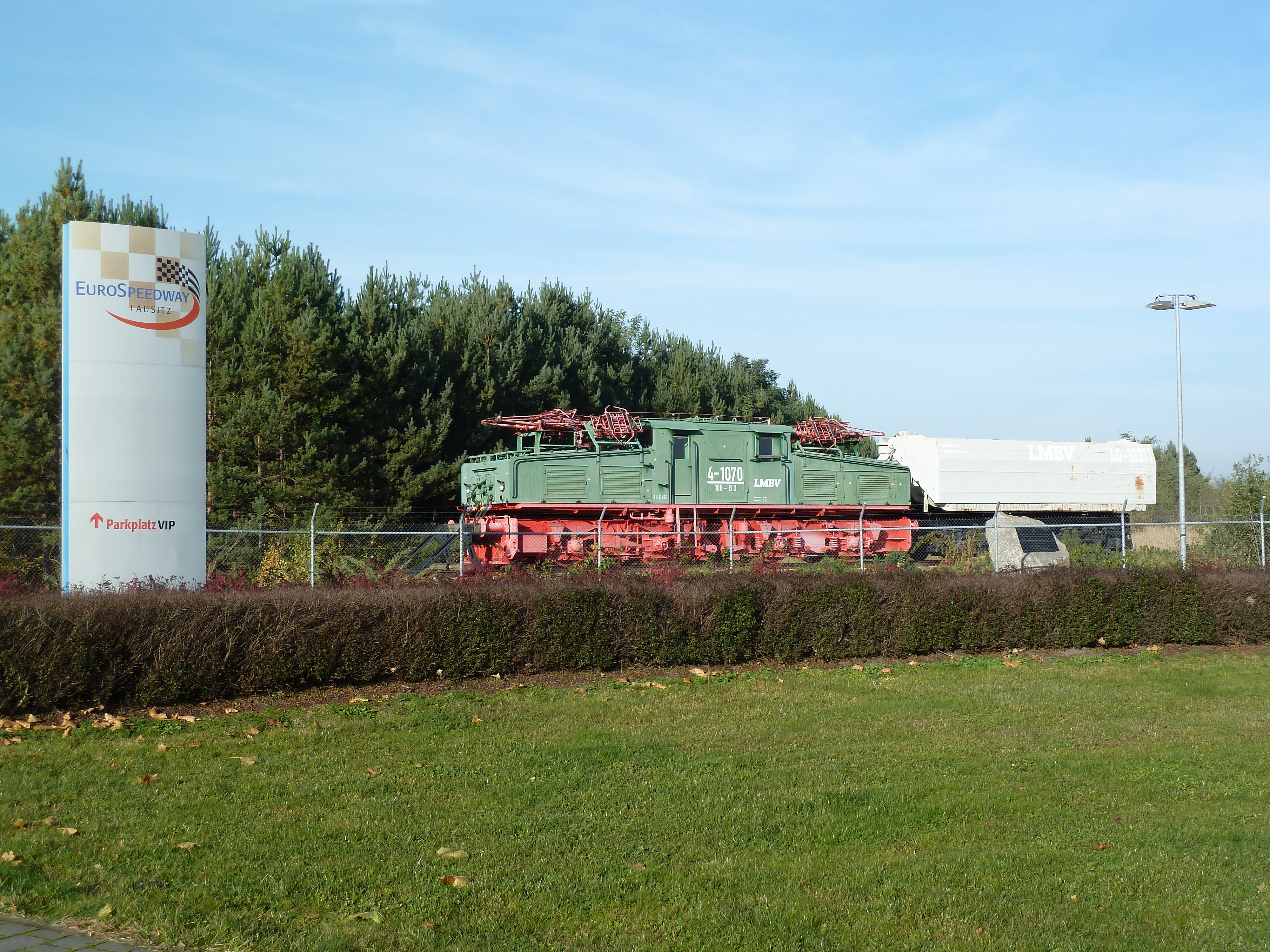 Denkmalzug am Parkplatz des EuroSpeedway Lausitz 29.10.2010